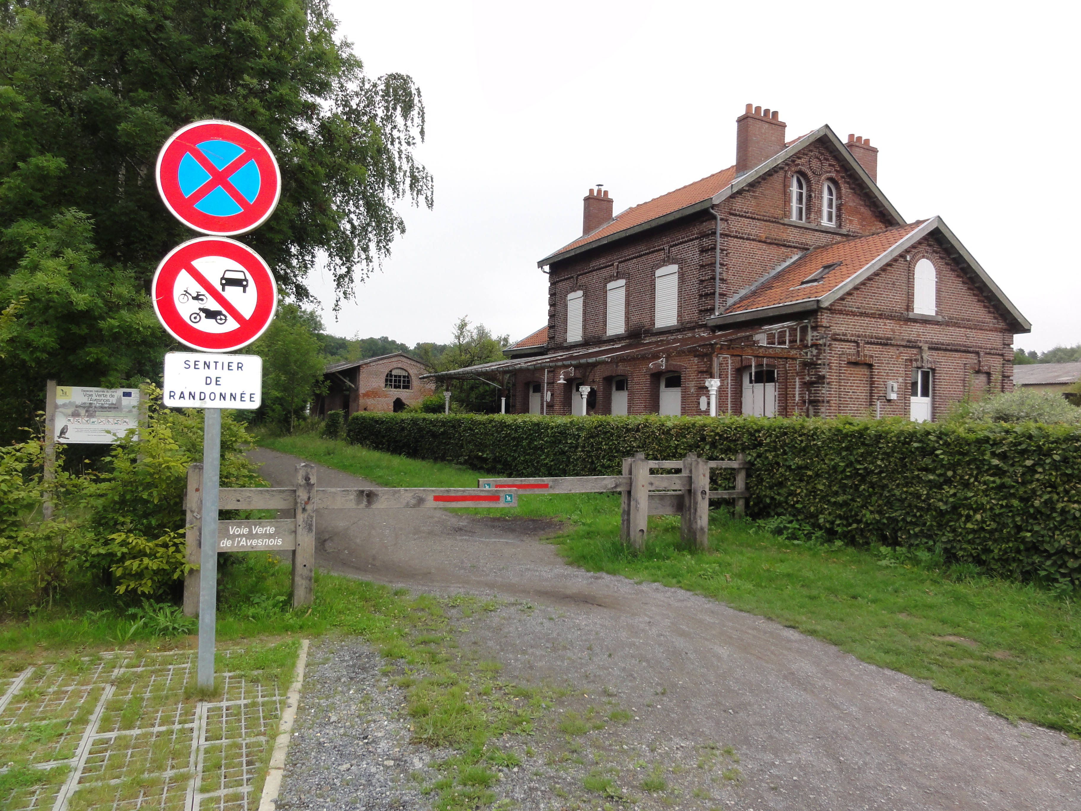 Ferrière-la-Petite (Nord, Fr) ancienne gare, avec l'ancien chemin de fer, transformé en chemin de randonnée et piste cyclable "Voie verte de l'Avesnois"